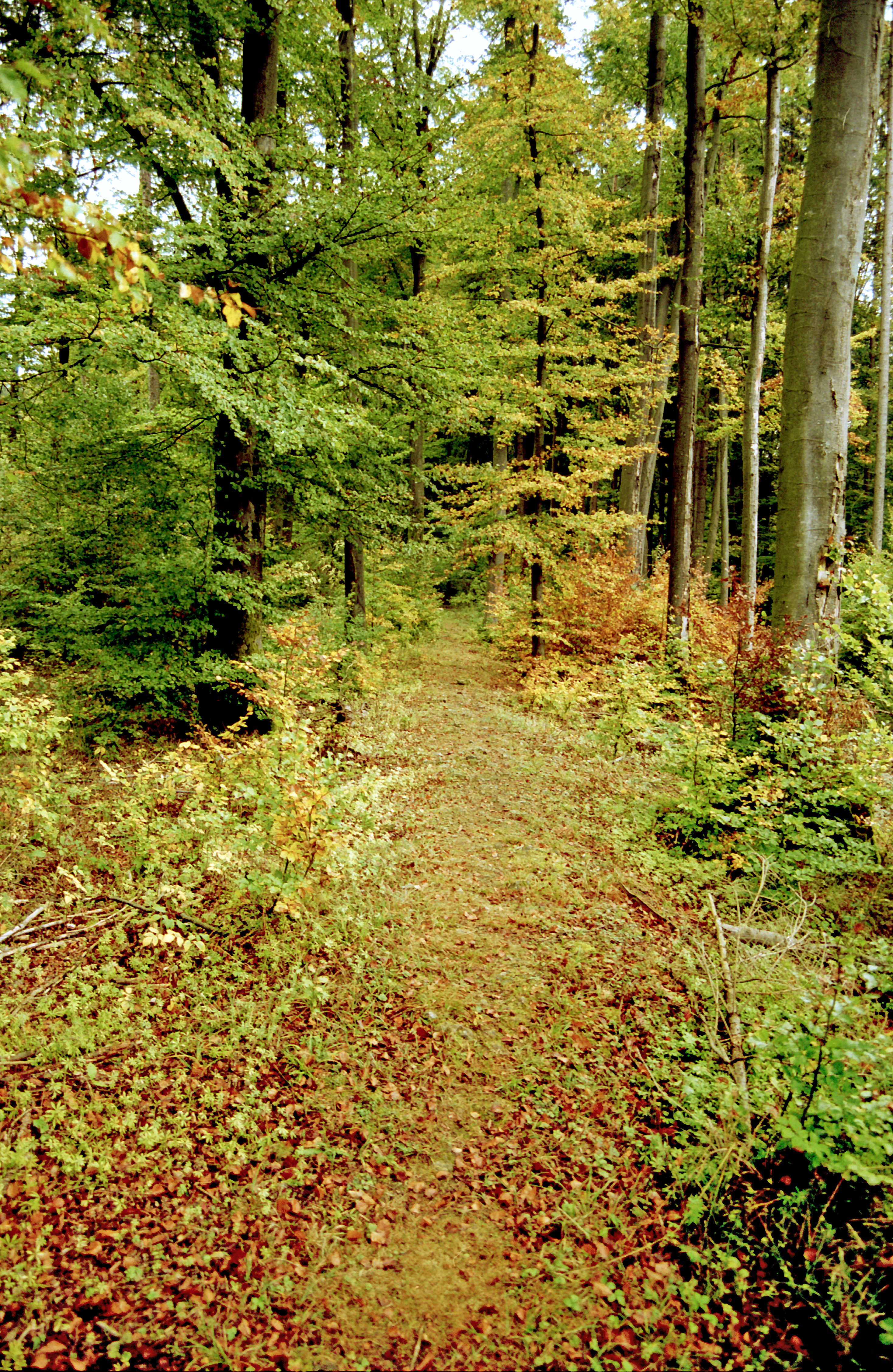 Der Limes auf halber Strecke zwischen Wp 14/76 und Wp 14/77. Blick nach Nordwesten.